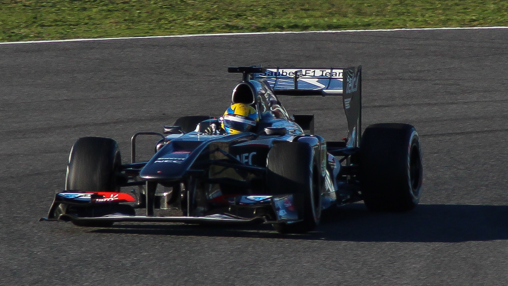 Fotos hechas el 7 de Febrero de 2013 en el circuito de Jerez, plena pre-temporada de F1. Would you like to follow me on Instagram and Twitter?